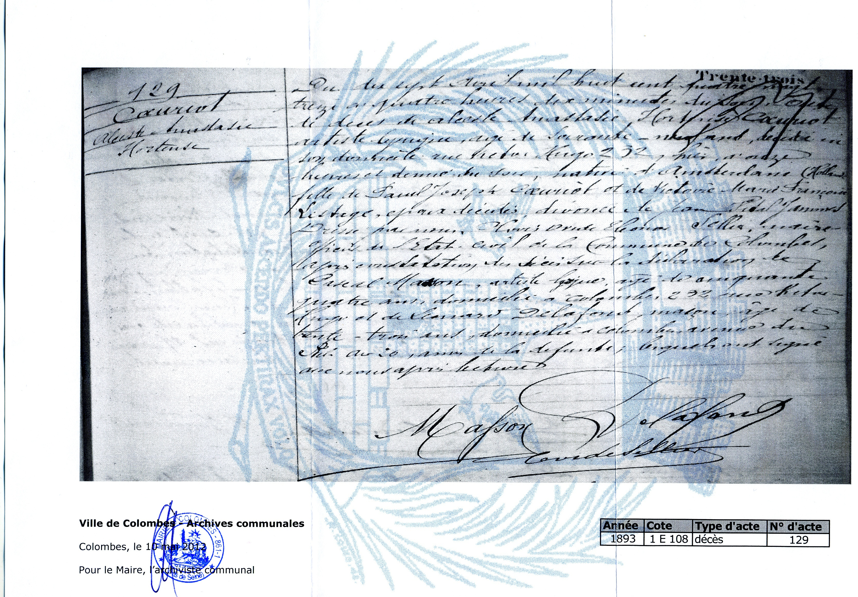 Acte de décès d'Alceste Coeuriot, communiqué par les Archives Municipales de Colombes le 10 mai 2012, publié avec leur aimable autorisation TranscriptionDu dix sept Avril mil huit cent quatre vingt treize à quatre heures dix minutes du soir, acte de décès de Alceste Anastasie Hortense Cœuriot artiste lyrique, âgé de soixante-neuf ans, décédé en son domicile rue Victor Hugo 232, hier à onze heures et demie du soir, native d’Amsterdam (Hollande) fille de Paul Joseph Cœuriot et Victoire Marie Françoise Lestage, époux décédés, divorcée de Jean Vital Jammes Dressé par nous Co??? Oreste Eléonor Sellier, maire officier de l’état-civil de la commune de Colombes, après constatation du décès sur la déclaration de Pascal Masson, artiste lyrique, âgé de cinquante quatre ans, domicilié à Colombes, 232 rue Victor Hugo et de Léonard Delafond, maçon, âgé de trente-trois ans, domicilié à Colombes, avenue du ?? au 26, amis de la défunte, lesquels ont signé avec nous après lecture Masson Delafond Co??? Sellier En marge : 129 Cœuriot Alceste Anastasie Hoortense